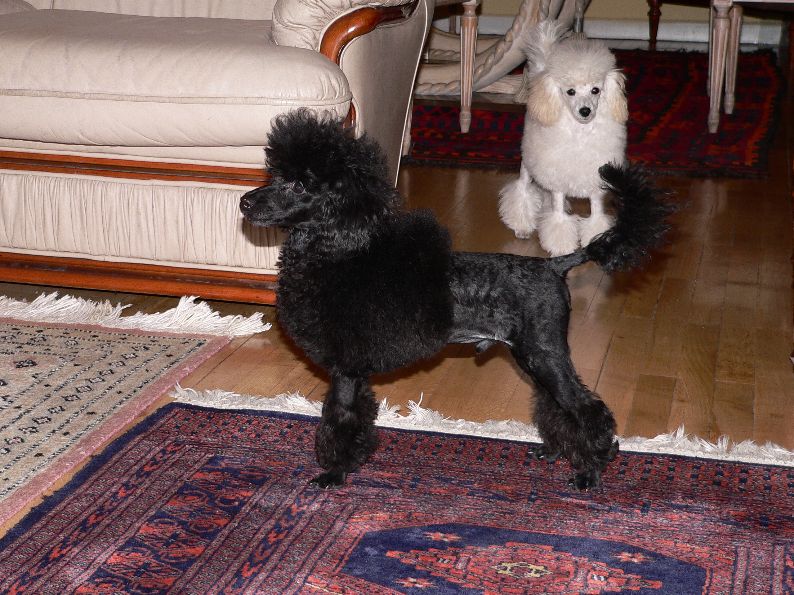 Caniches Toy, 18 semanas Description: 4 months dogs Breed: Poodle Origin: Caniche del Cartojal, Marbella, Spain Size: Toy Photographer: © Manuel González Olaechea y Franco Shot date : January, 29th , 2006